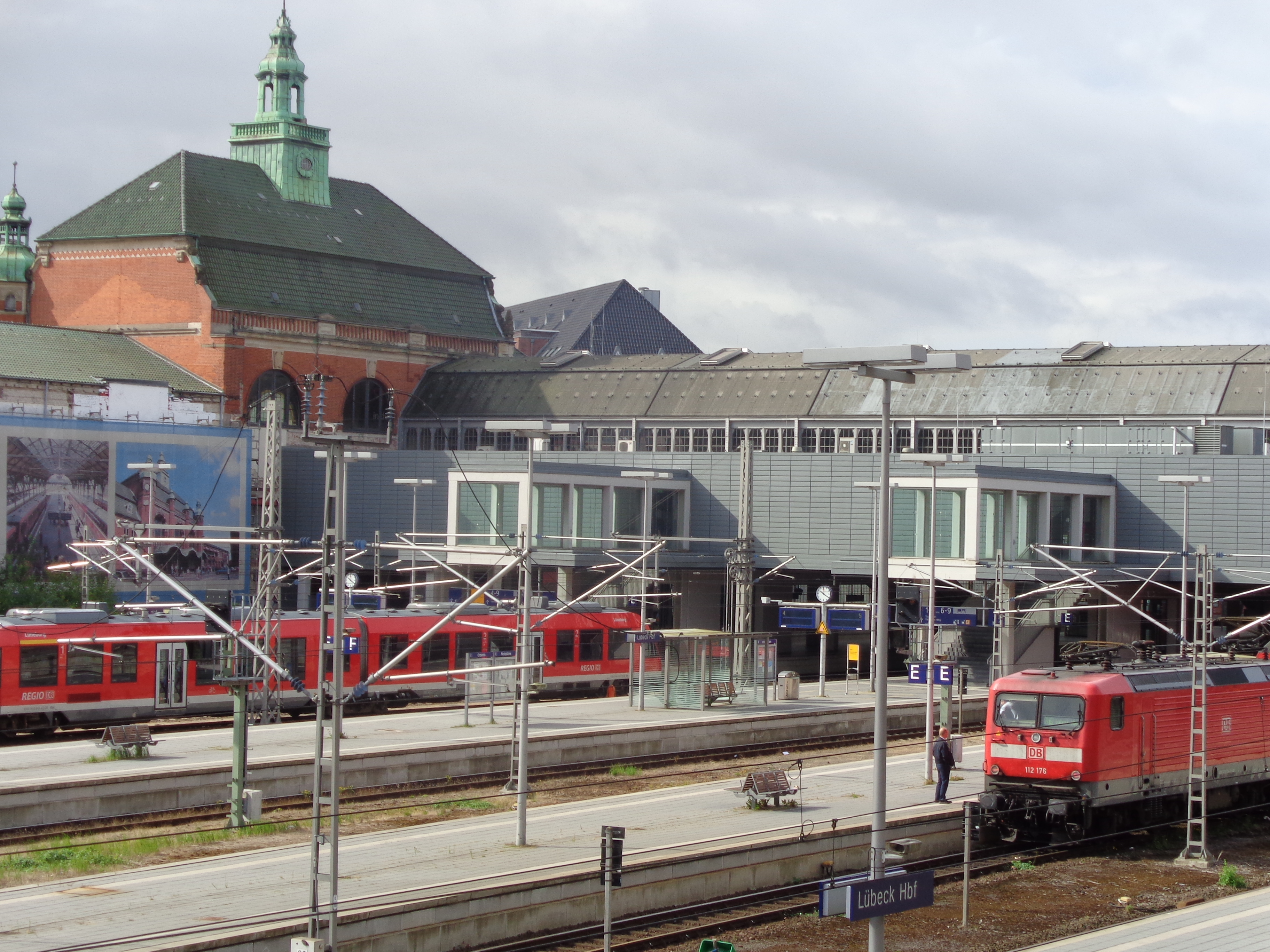 Rückansicht des Hauptbahnhofs Lübeck